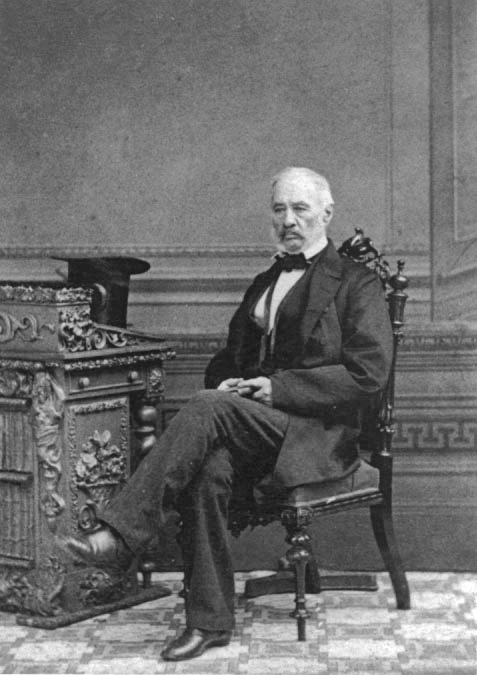 Philippe Aubert de Gaspé (1786-1871). Photographie par Livernois (possiblement Jules Isaï). Quelques détails sur la photographie sont dsponibles à la source citée ci-dessous.